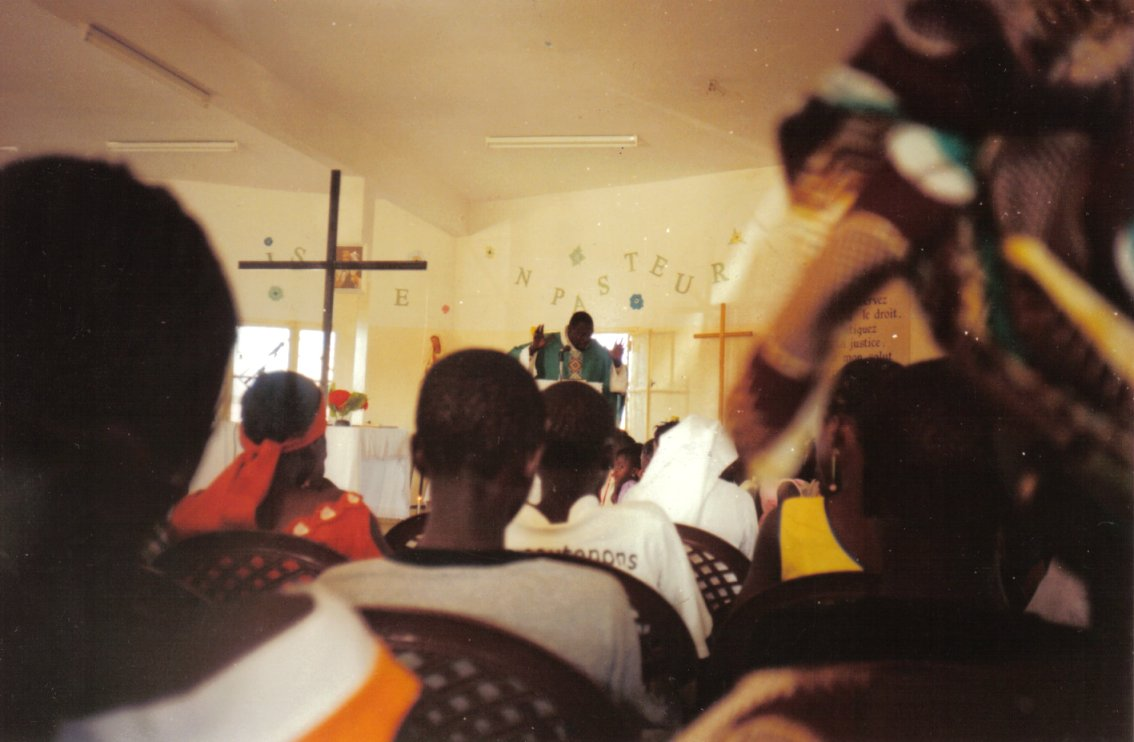 Messe du dimanche à Thiès, Sénégal